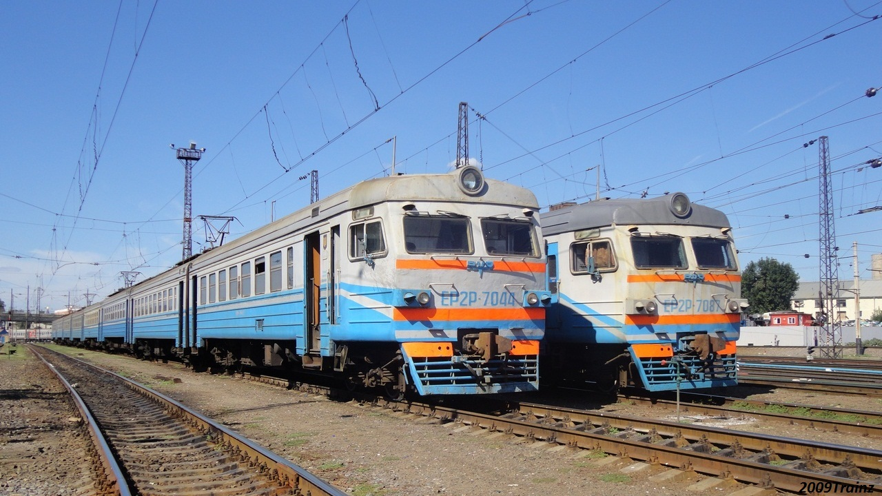 Построен в десятивагонной составности. С завода поступил в моторвагонное депо Харьков-8 км (Южной ж. д.) КР Рижский ВЗ 08.1992 г. (вагон 08, фиктивный ремонт) КР-2 Киевский ЭВРЗ 12.1999 г.; ТР-3У ТЧ-14 ЮЖН 04.2007 г.; КРП Киевский ЭВРЗ 25.10.2016 г.